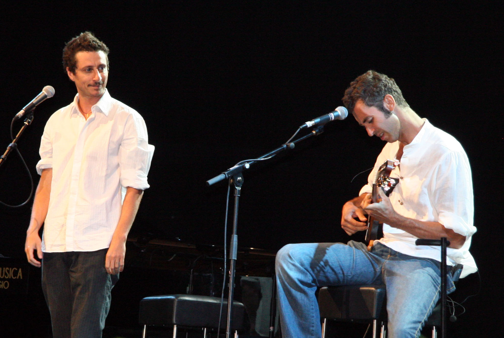 Luca Bizzarri (a sinistra) e Paolo Kessisoglu (a destra) al Festival Teatro Canzone Giorgio Gaber 2008 di Viareggio.